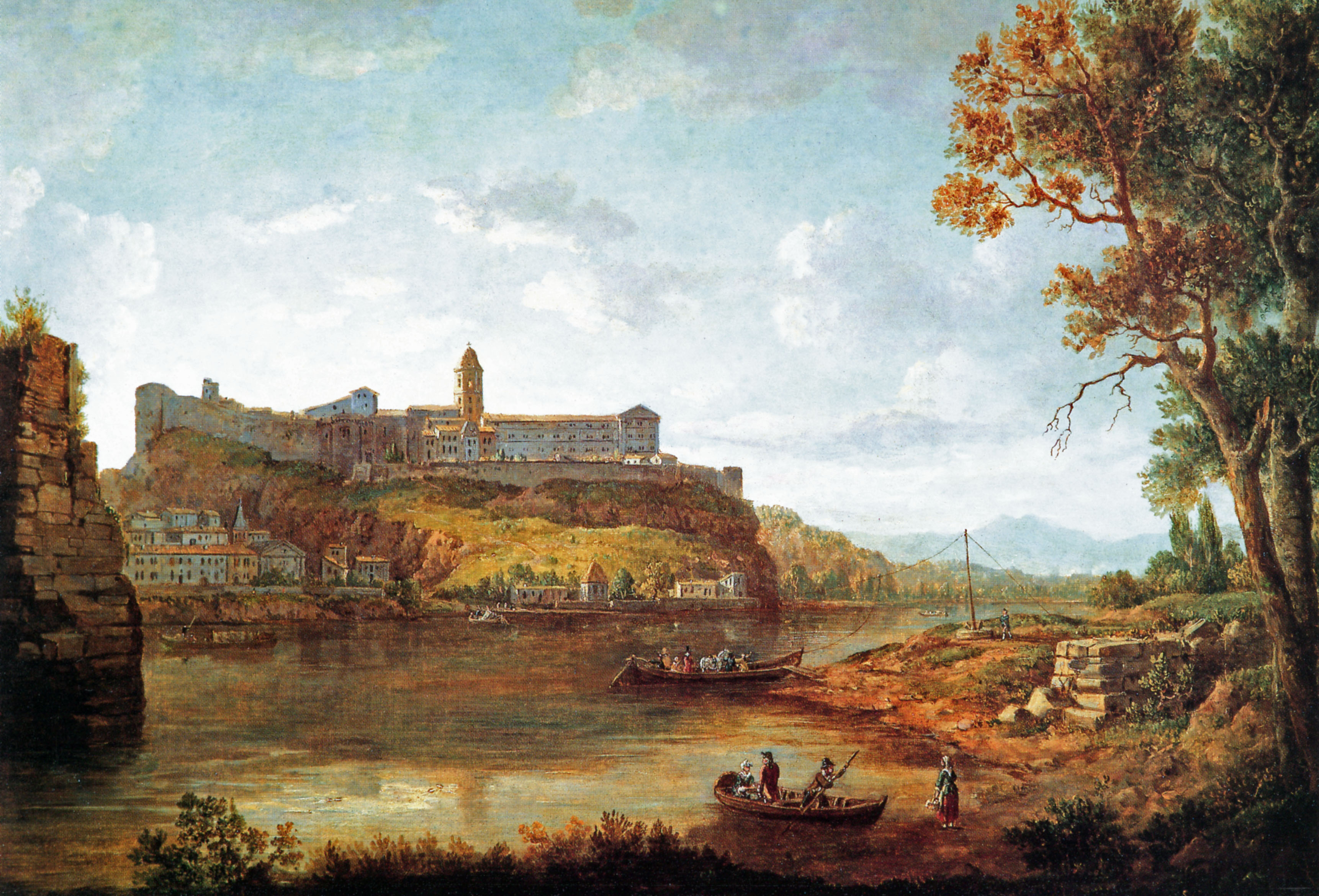 Pêche à l'alose sur les berges de l'île de la Barthelasse avec en fond le mont Andaon et l'abbaye Saint-André de Villeneuve-lès-Avignon